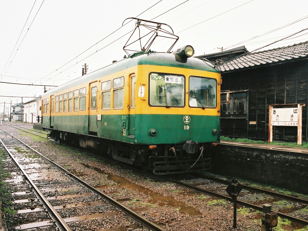 新潟交通電車線木場駅 (新潟県)にて撮影。